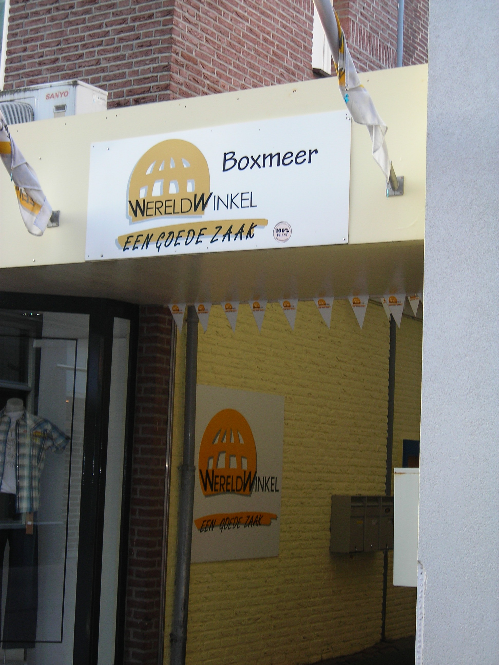 A Wereldwinkel shop in Boxmeer